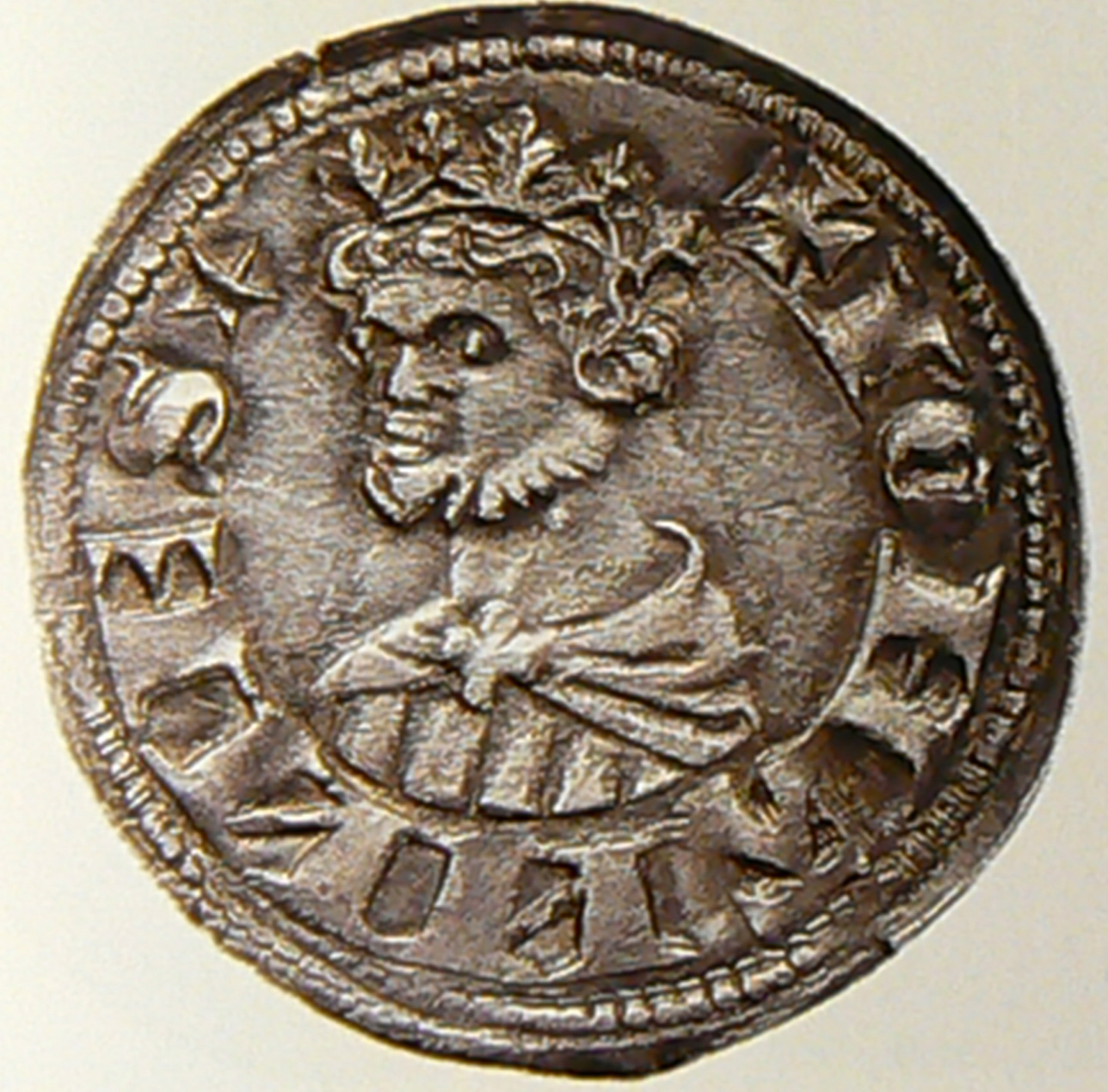 Parmský groš Jana Lucemburského